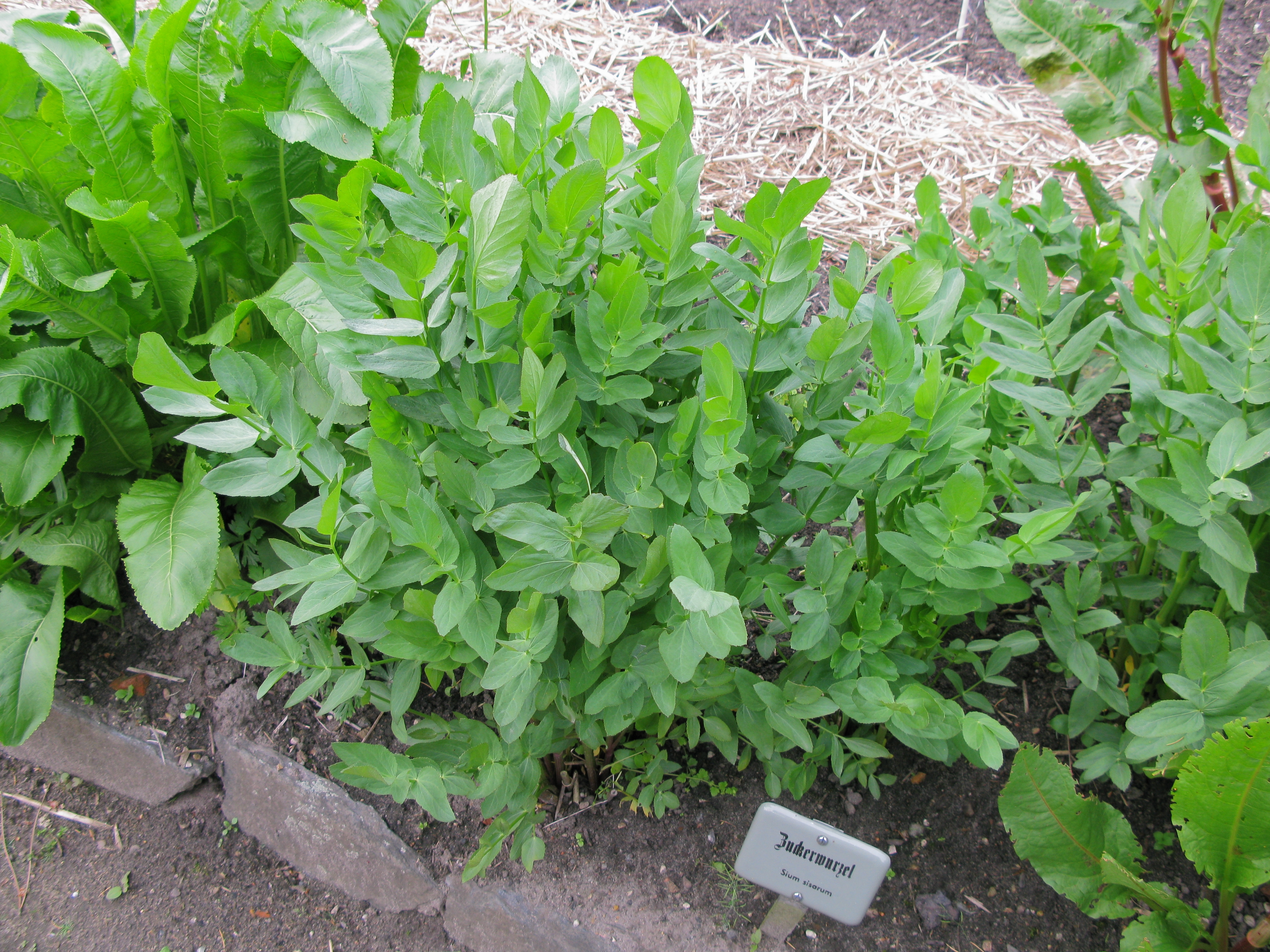 Zuckerwurzel